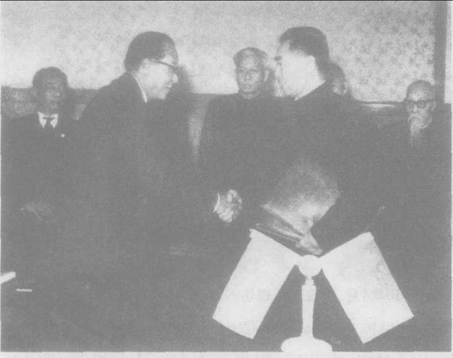 中文（中国大陆）: 1960年1月周恩来与奈温签订《中缅边界问题协定》与《中缅友好和互不侵犯条约》握手